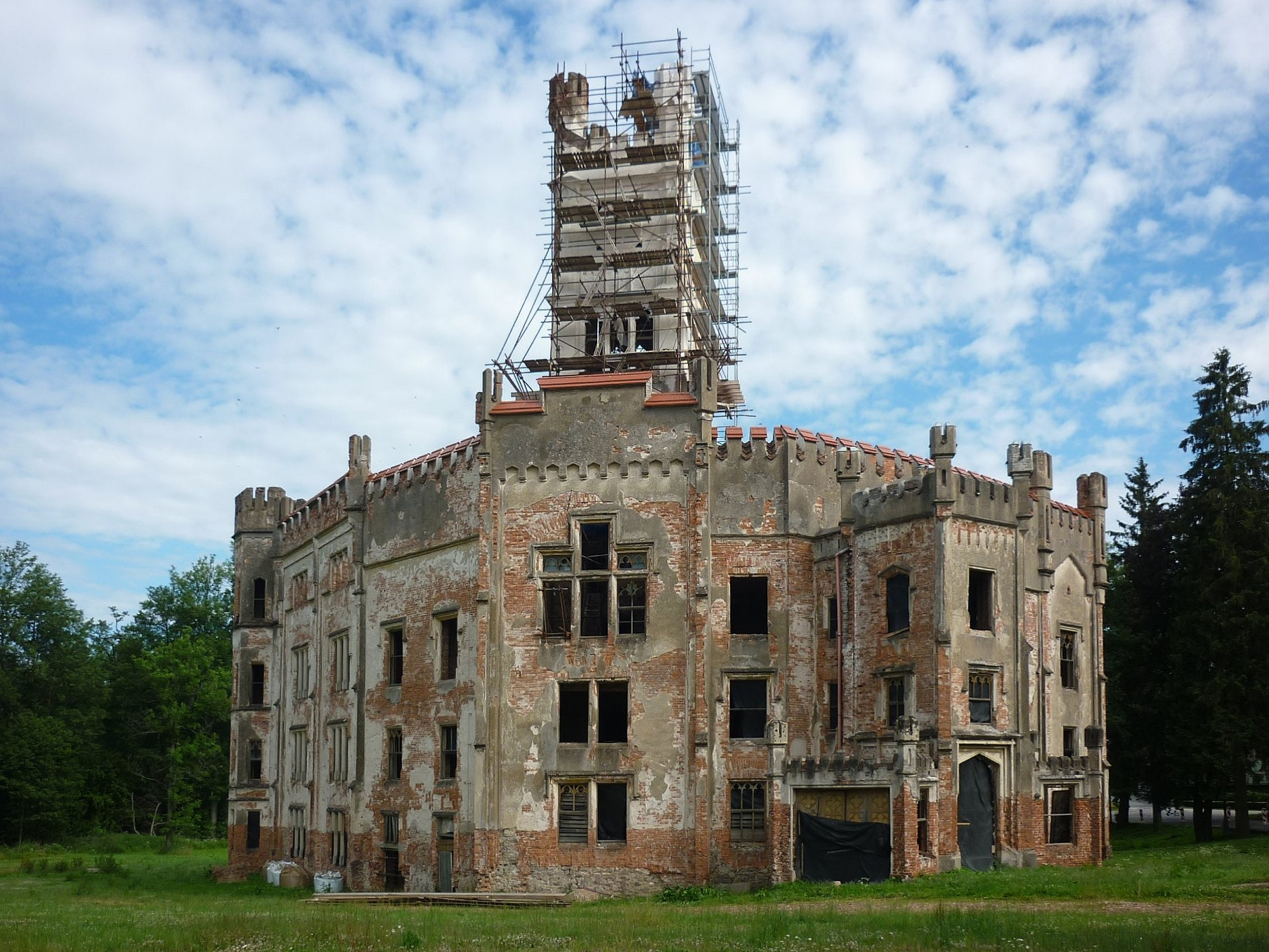 Zámek v Českém Rudolci - oprava v roce 2015